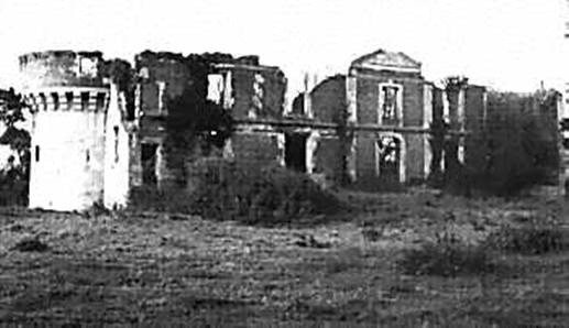 Château de Houlbec vers 1960